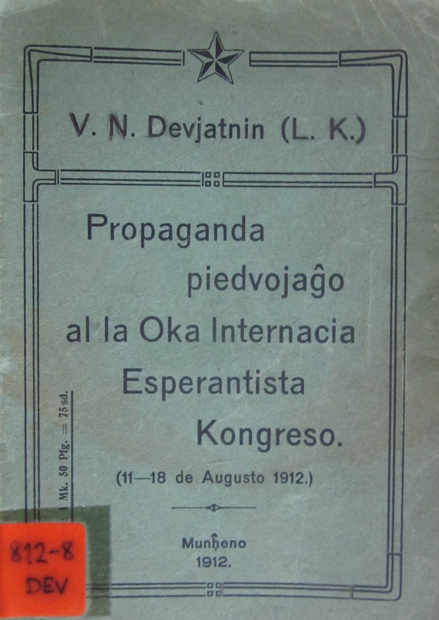 Kovrilo de la broŝuro "Propagana Piedvojaĝo" 1912